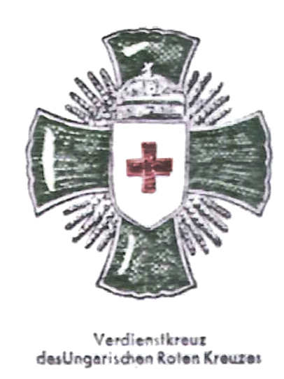 Darstellung der Verdienstkreuz des Ungarischen Roten Kreuzes